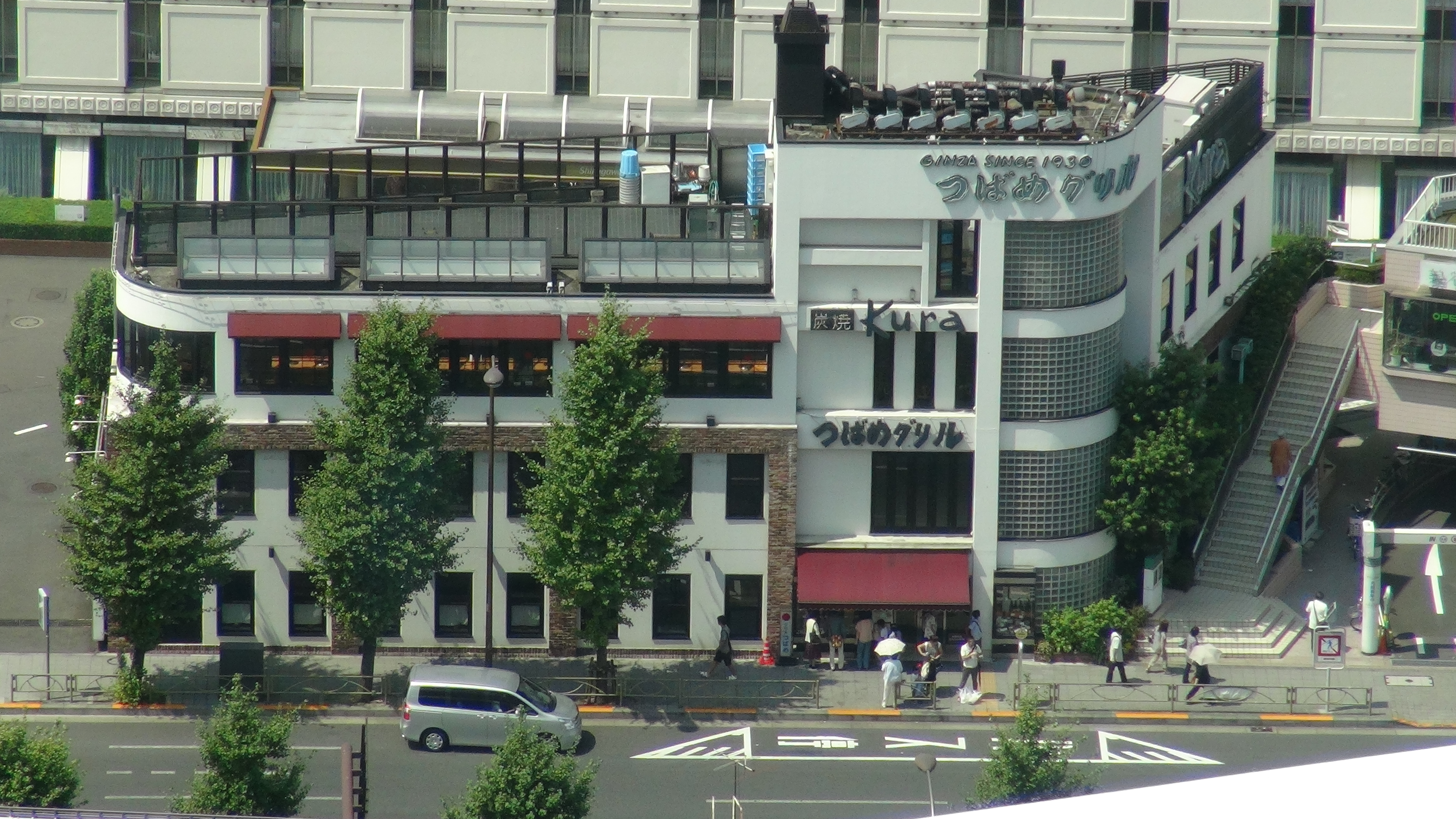 つばめグリル品川駅前店